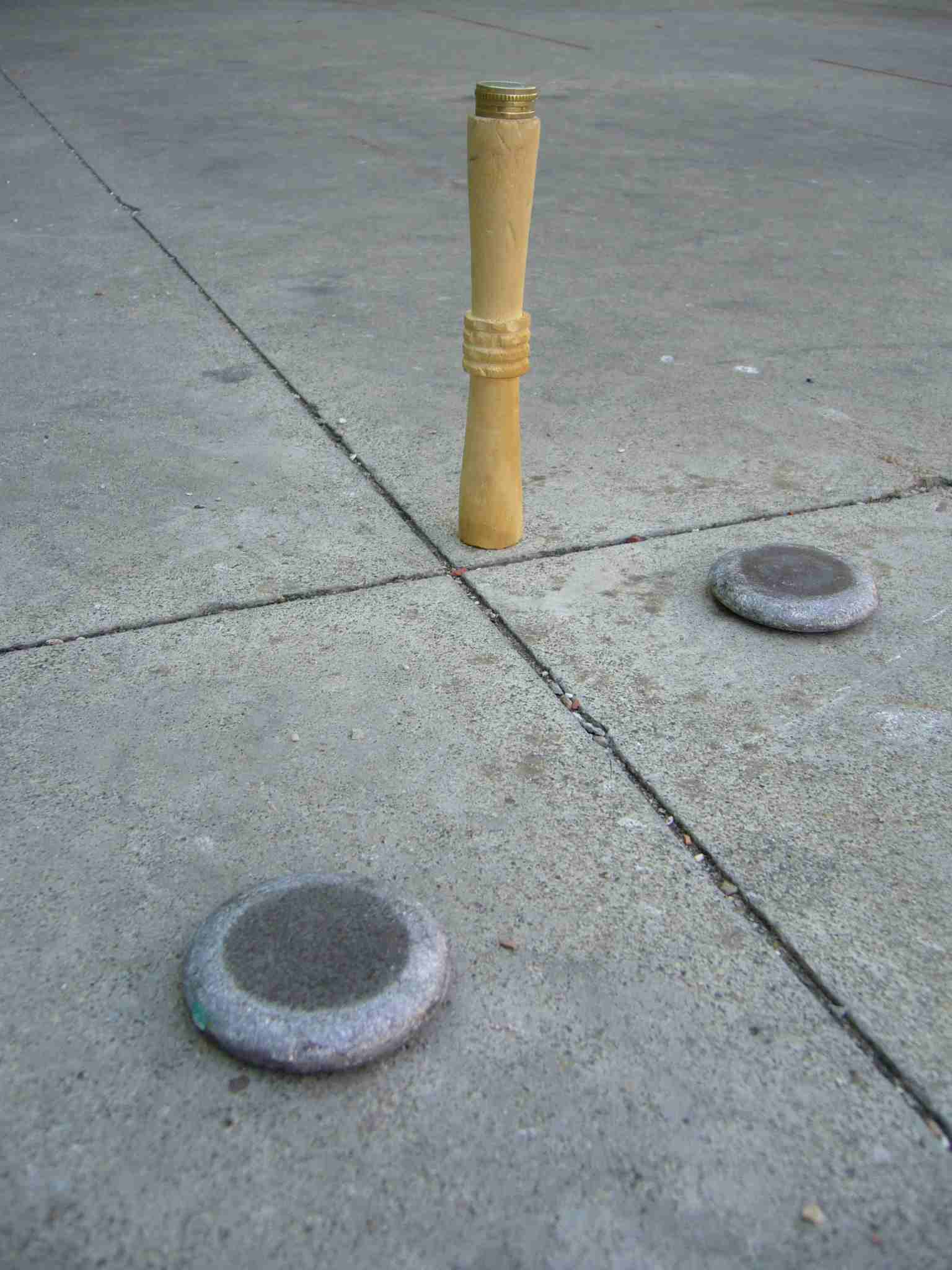 Fotografía de una Tuta en una pista de cemento, los dos Doblones y las monedas preparadas sobre la Tuta para jugar.